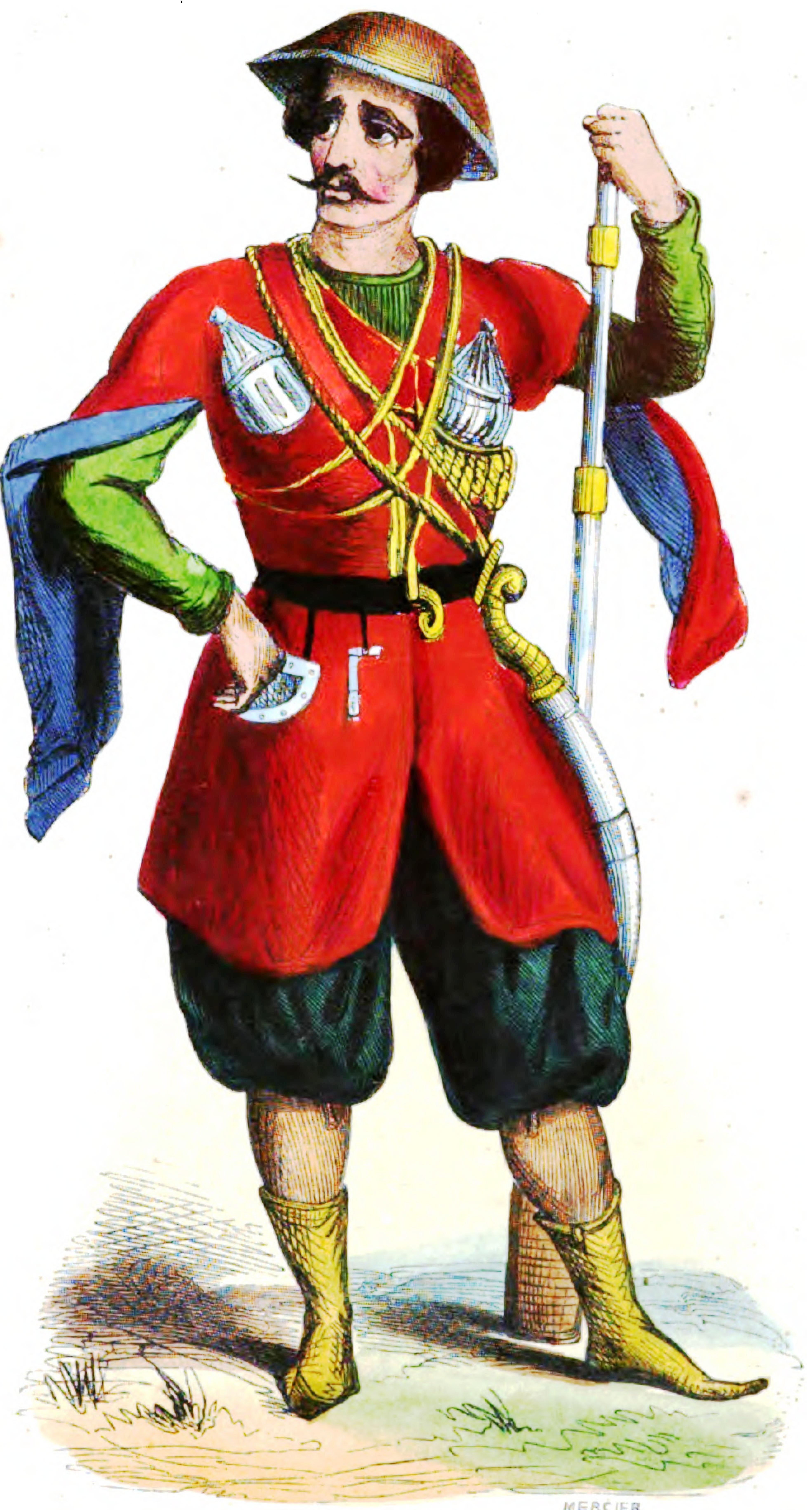 Mercier. Prince Imerethian.